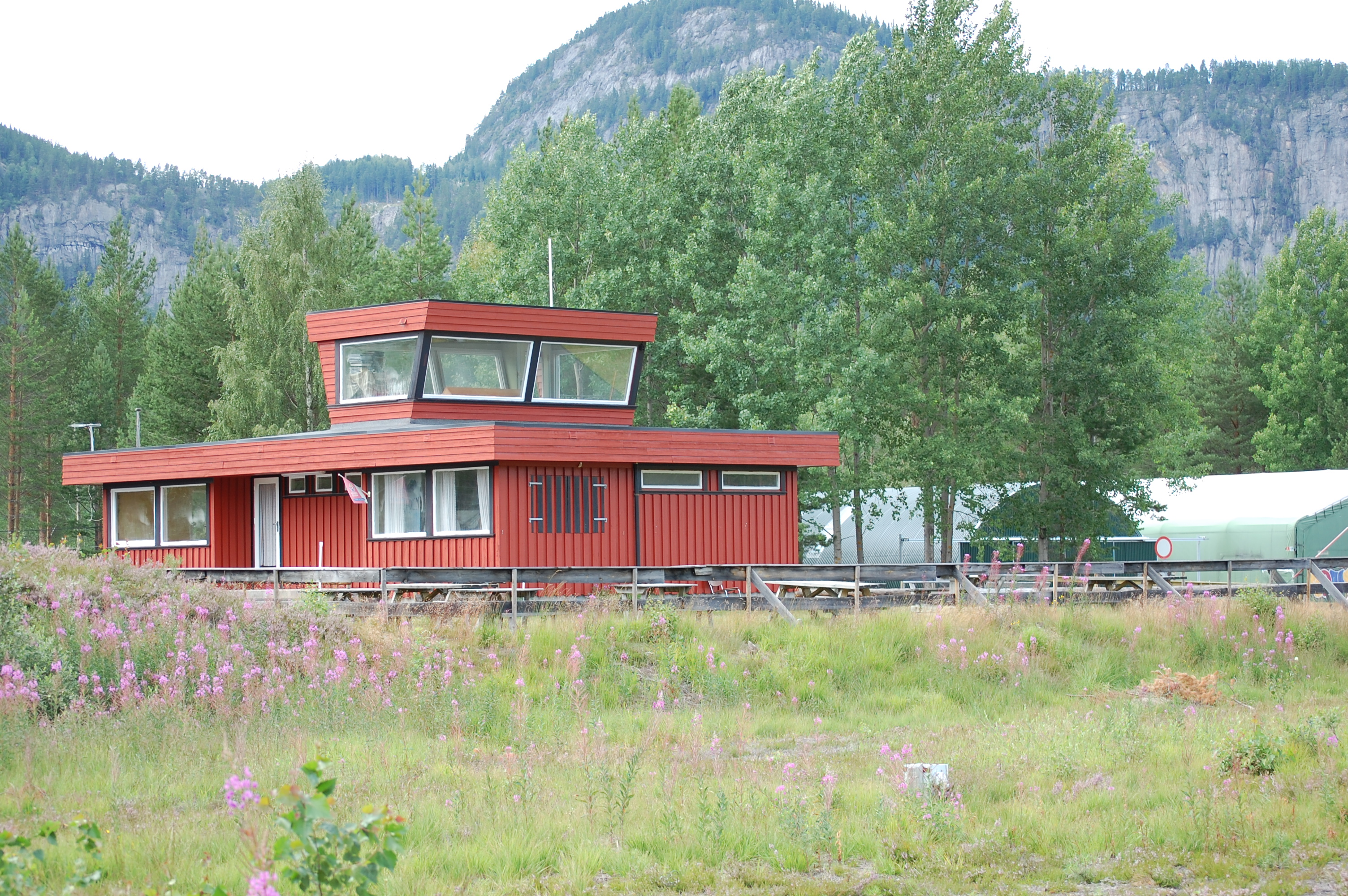 Tårnet på Fyresdal flyplass